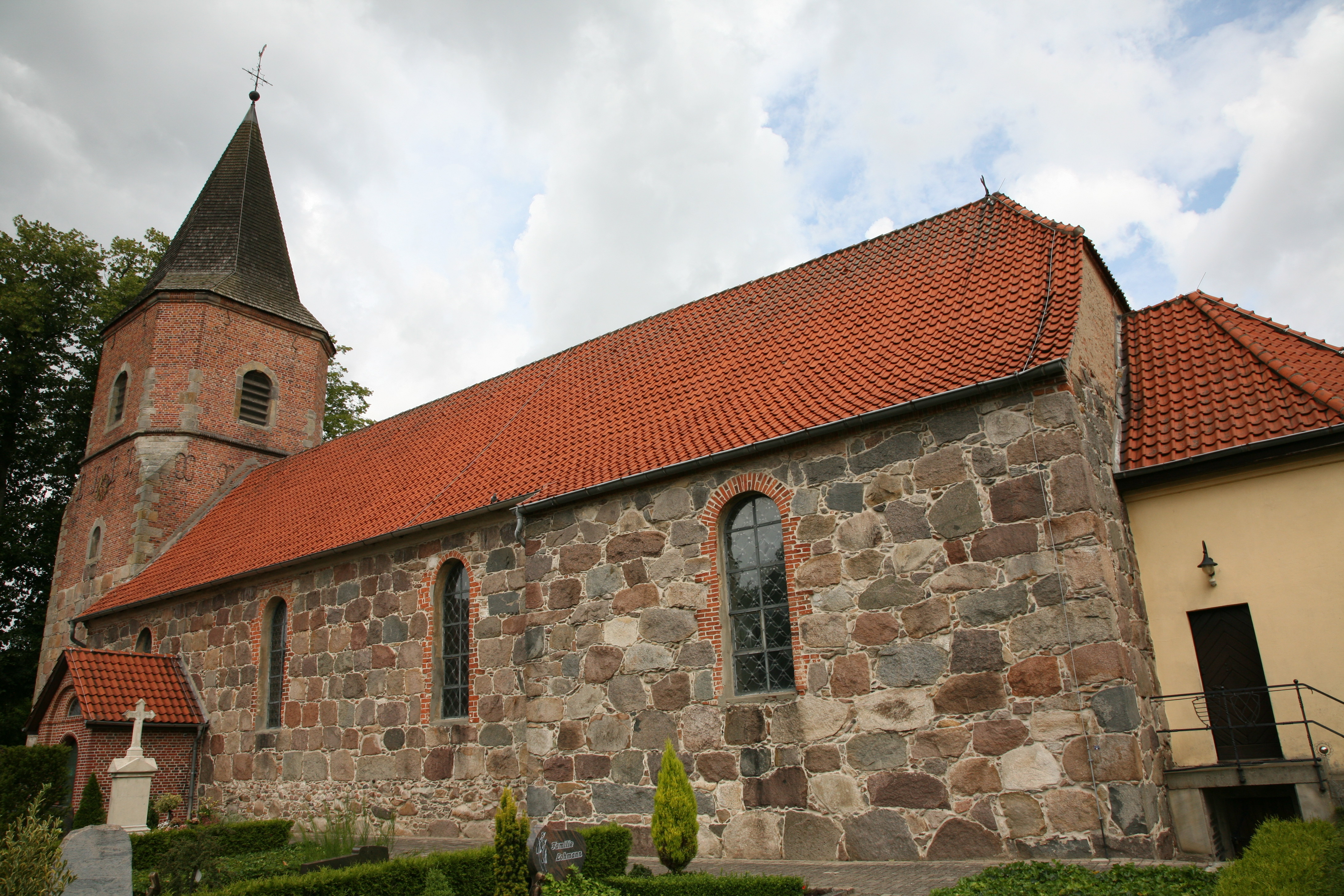 St. Marien Kirche is a church in Oythe in Vechta, Niedersachsen